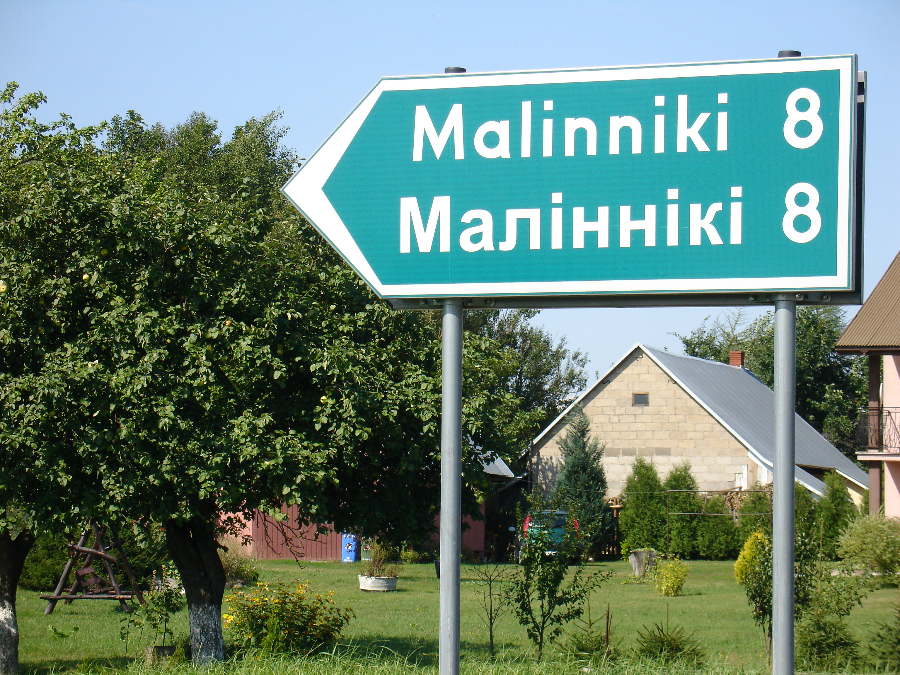 Dwujęzyczna tablica w Malinnikach w gminie Orla